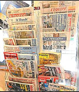 Revistero en un espacio público en Francia, con publicaciones del 19 de julio de 2012.